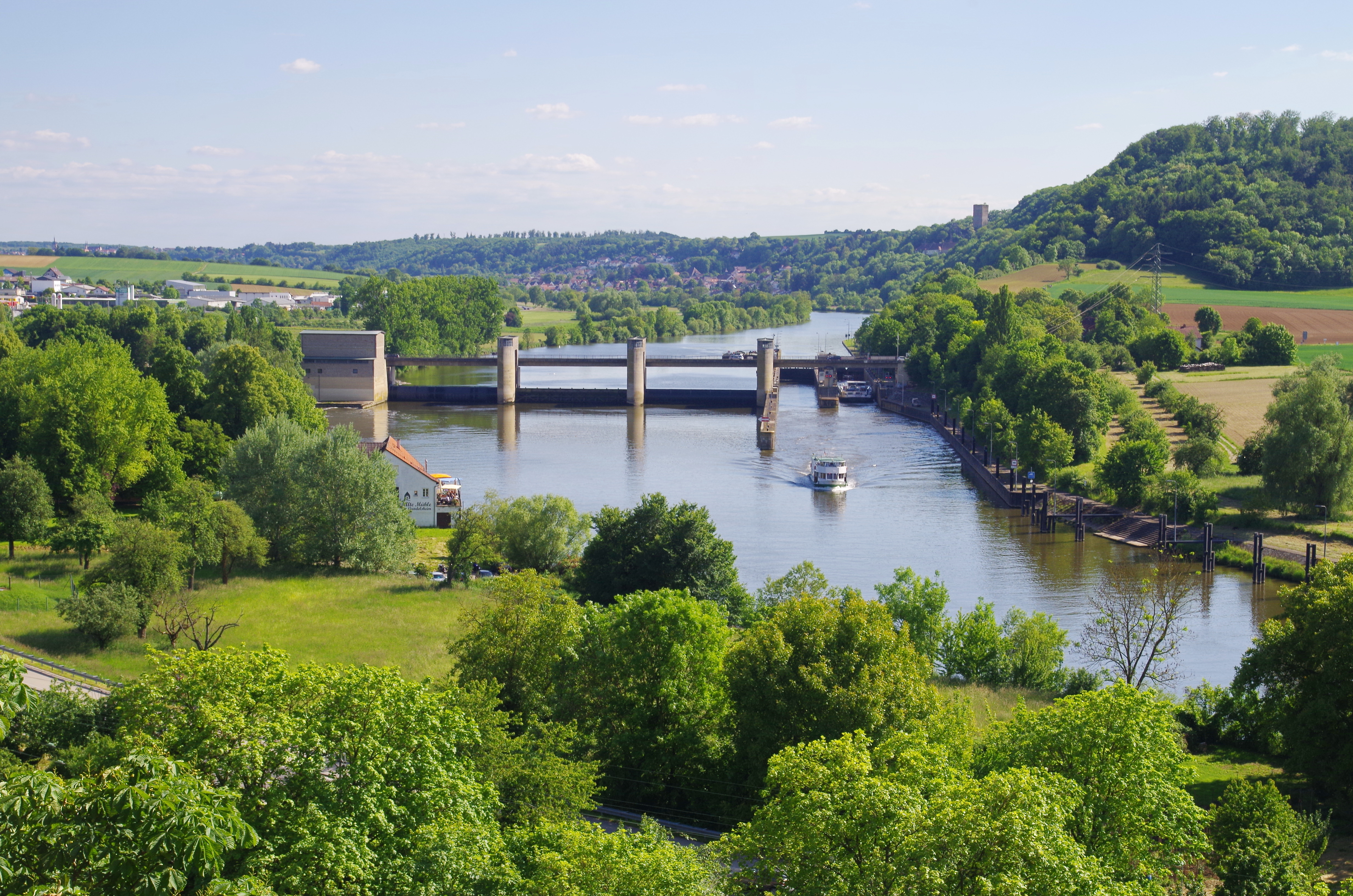 Schleuse am Neckar bei Gundelsheim